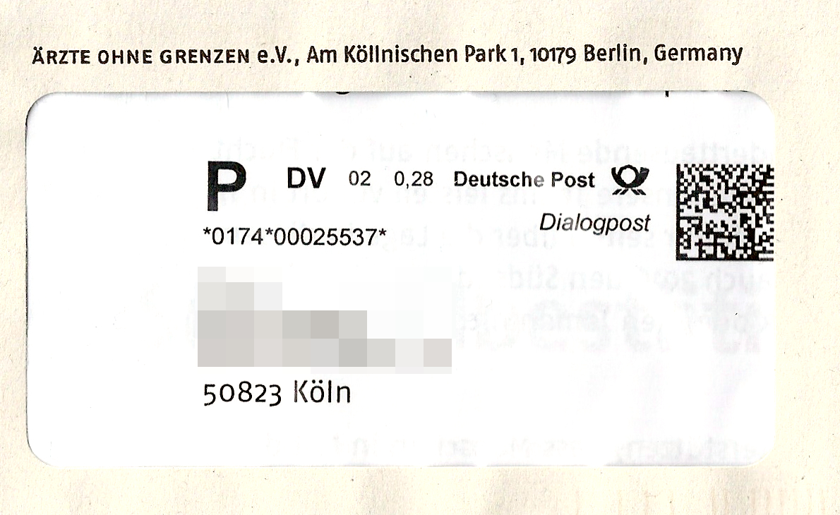 Adressfenster eines Fensterbriefumschlages mit DV-Freimachung, versandt durch die Deutsche Post, frankiert als Dialogpost (Nachfolger der Infopost). Rechts außen ein DataMatrix-Code